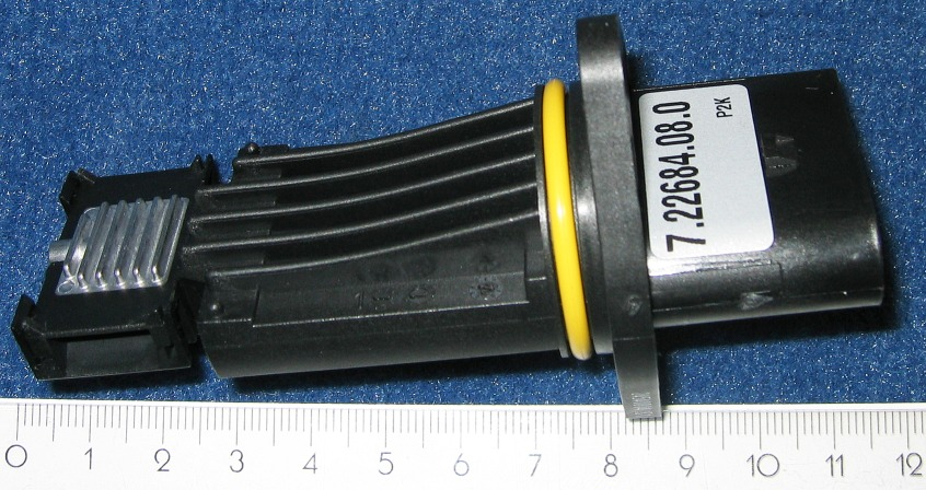 Luftmassenmesser